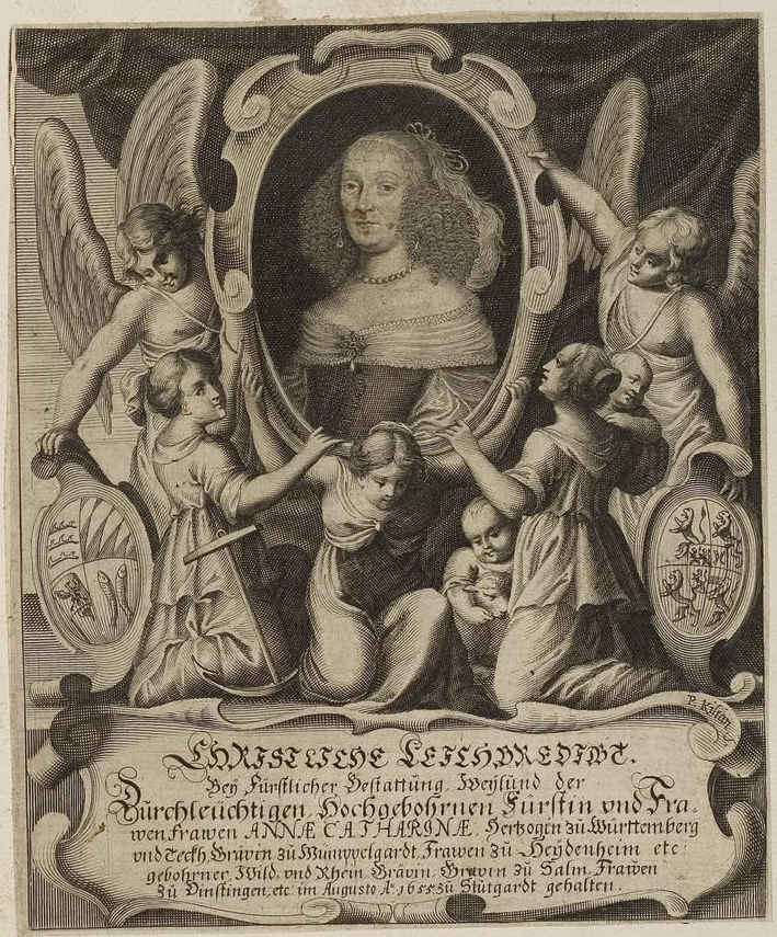 Grafik aus dem Klebeband Nr. 1 der Fürstlich Waldeckschen Hofbibliothek Arolsen Motiv: Anna Catharina von Salm-Kyrburg, Ehefrau von Eberhard III. Herzog von Württemberg